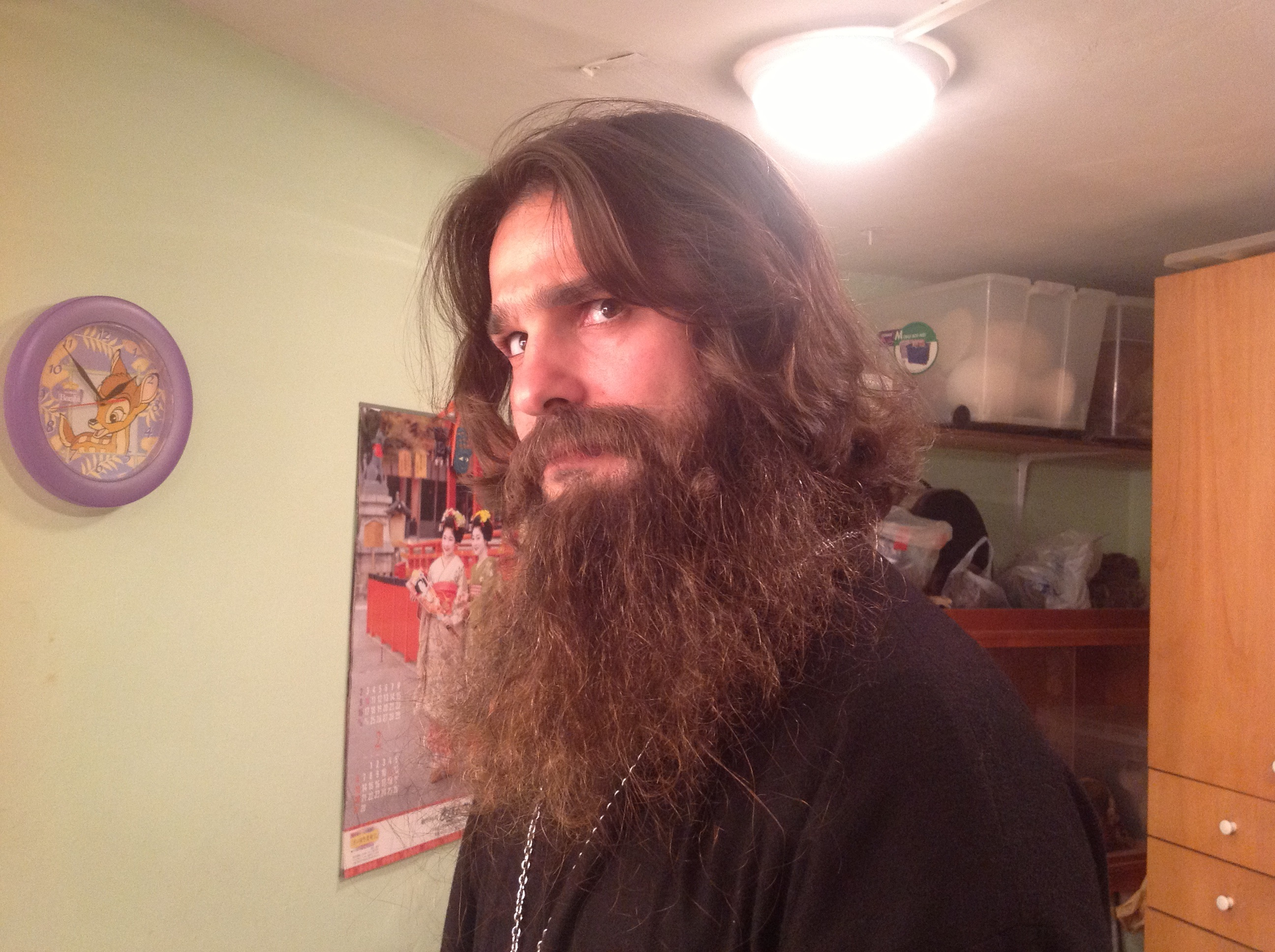 דניאל צ'רניש בהצגה "פיניטה לה קומדיה", תיאטרון גשר